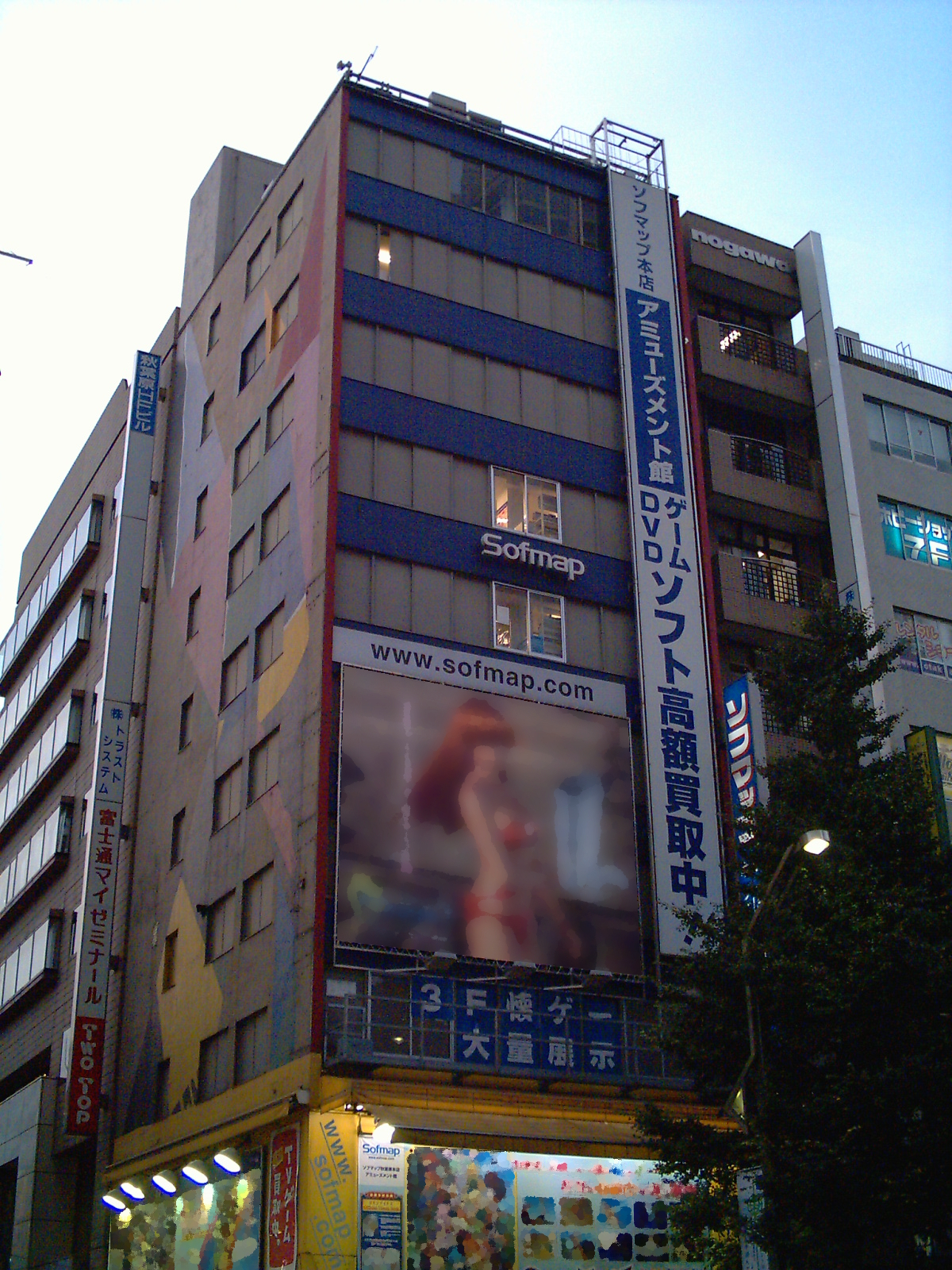 Sofmap Shop Akihabara in Japan